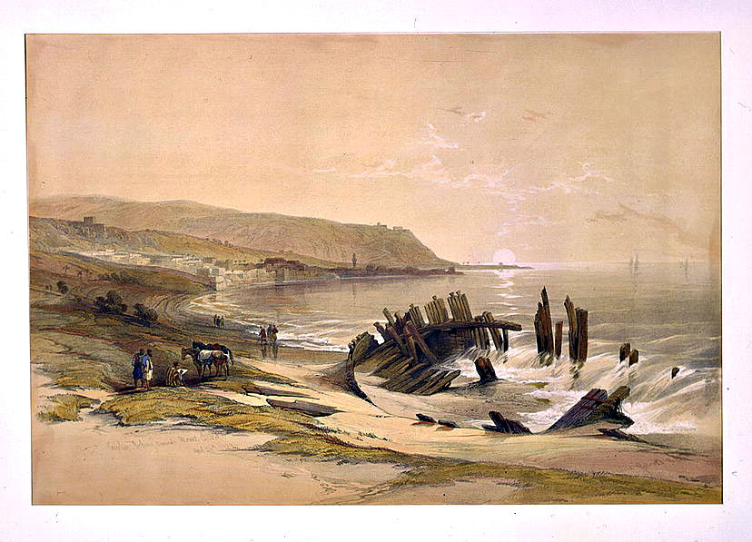 Caiphas looking towards Mount Carmel April 24th 1839, by David Roberts. On the mount tht fortress El Burj ציורו של דיויד רוברט. חיפה מבט על הכרמל. צויר ב- 24 באפריל 1839. על רכס ההר מבצר בורג' א-סלאם, מתחת למבצר "חיפה החדשה" שנבנתה על ידי דאהר אל עומר